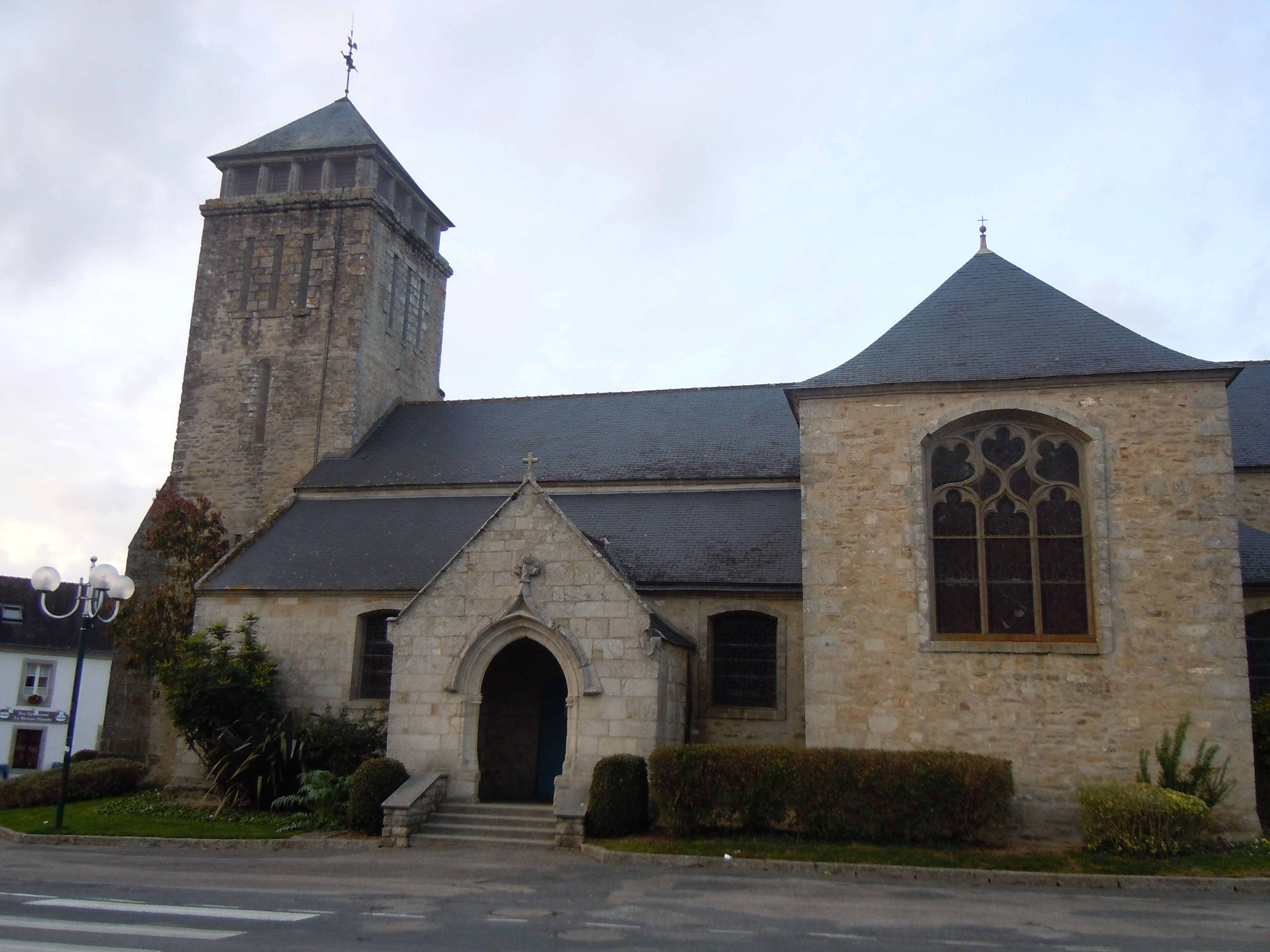 église paroissiale de Kernével (commune de Rosporden et département du Finistère)